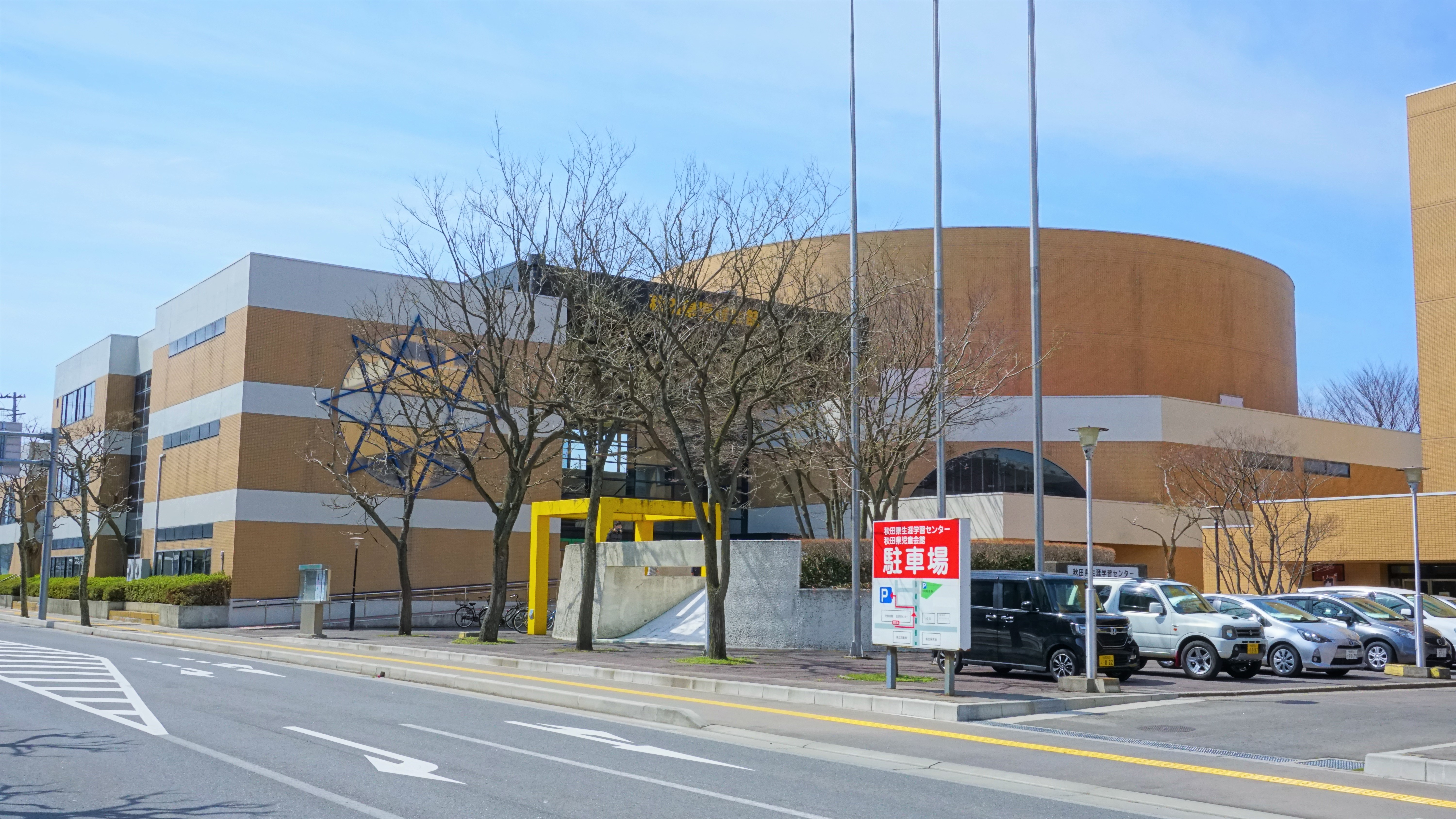 秋田県児童会館「みらいあ」（秋田市山王中島町）